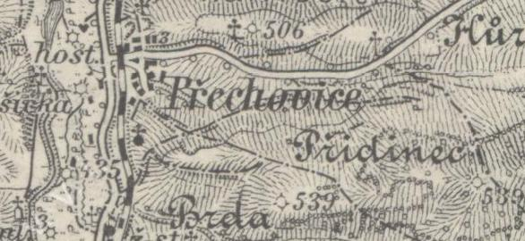 Přechovice na mapách III. vojenského mapování, které probíhalo ve druhé polovině 70. let 19. století.